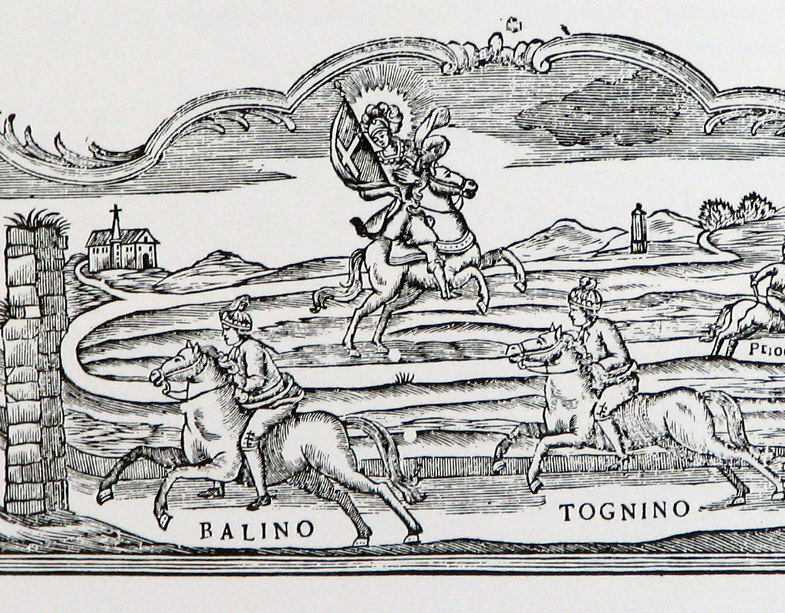 Particolare di un'incisione tratta da un sonetto per la corsa del Palio di Asti( incisione XVII-XVIII secolo).